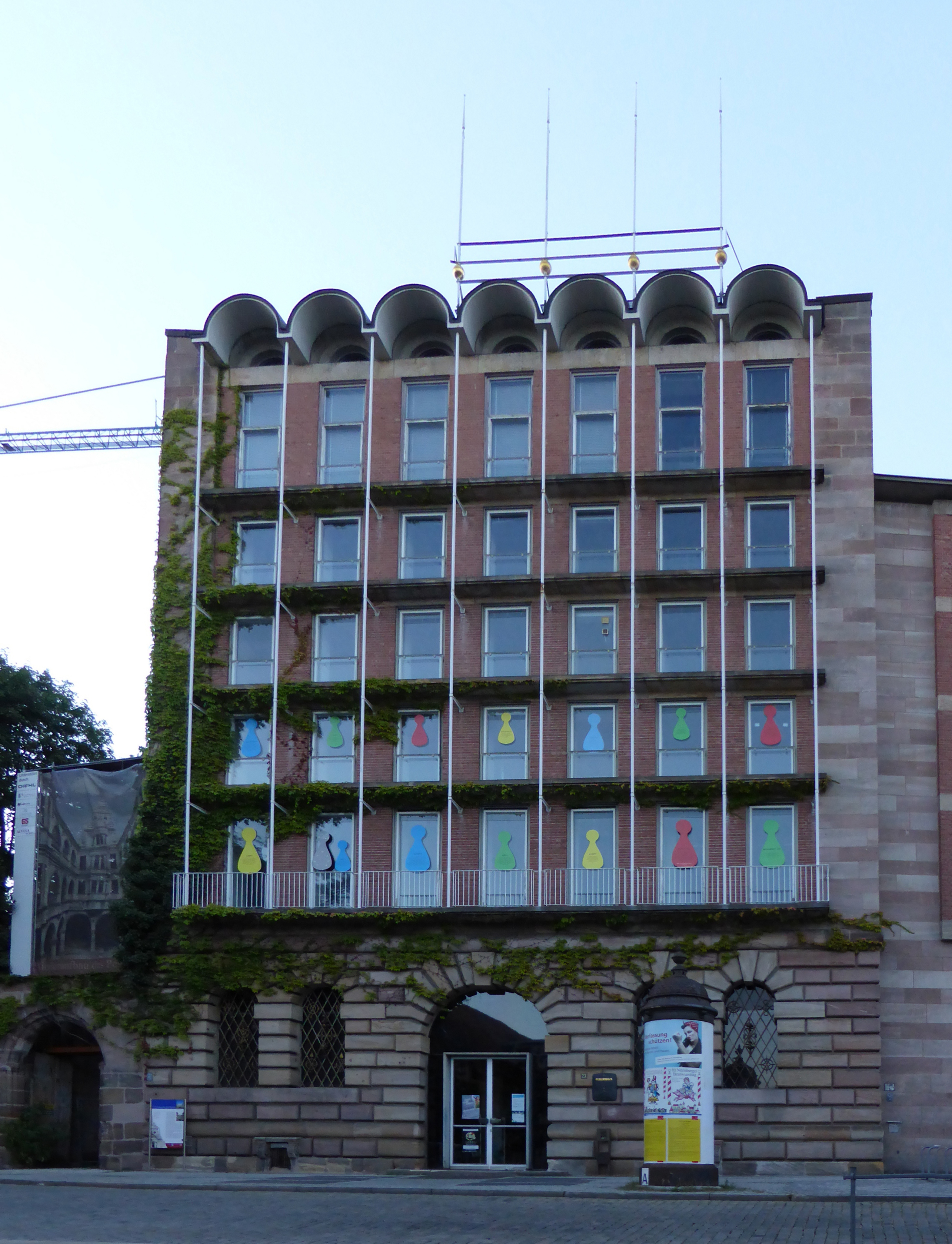 Germany, Bayern, Nuremberg, Egidienplatz 23